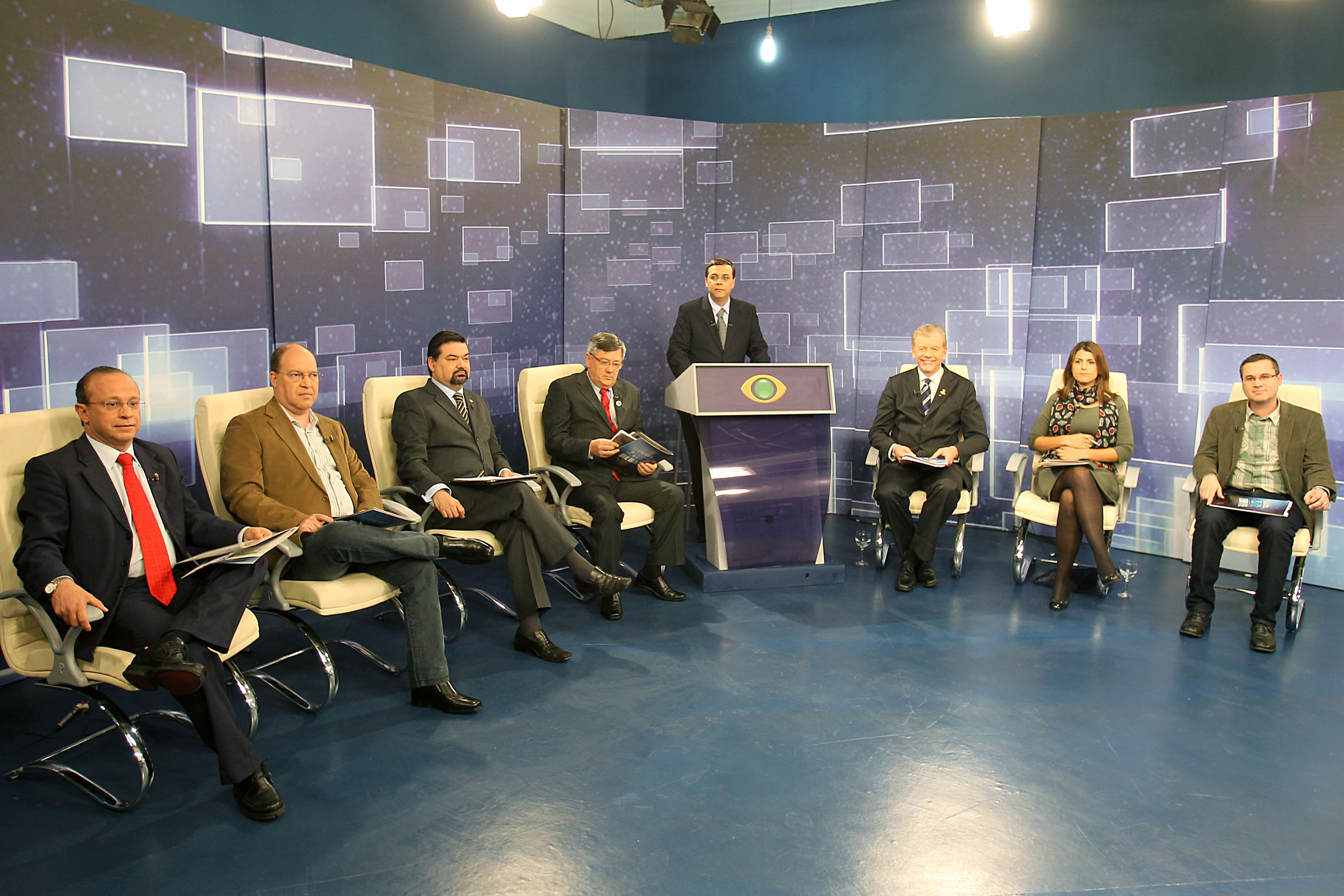 Os sete candidatos a prefeitura de Porto Alegre no debate da Band